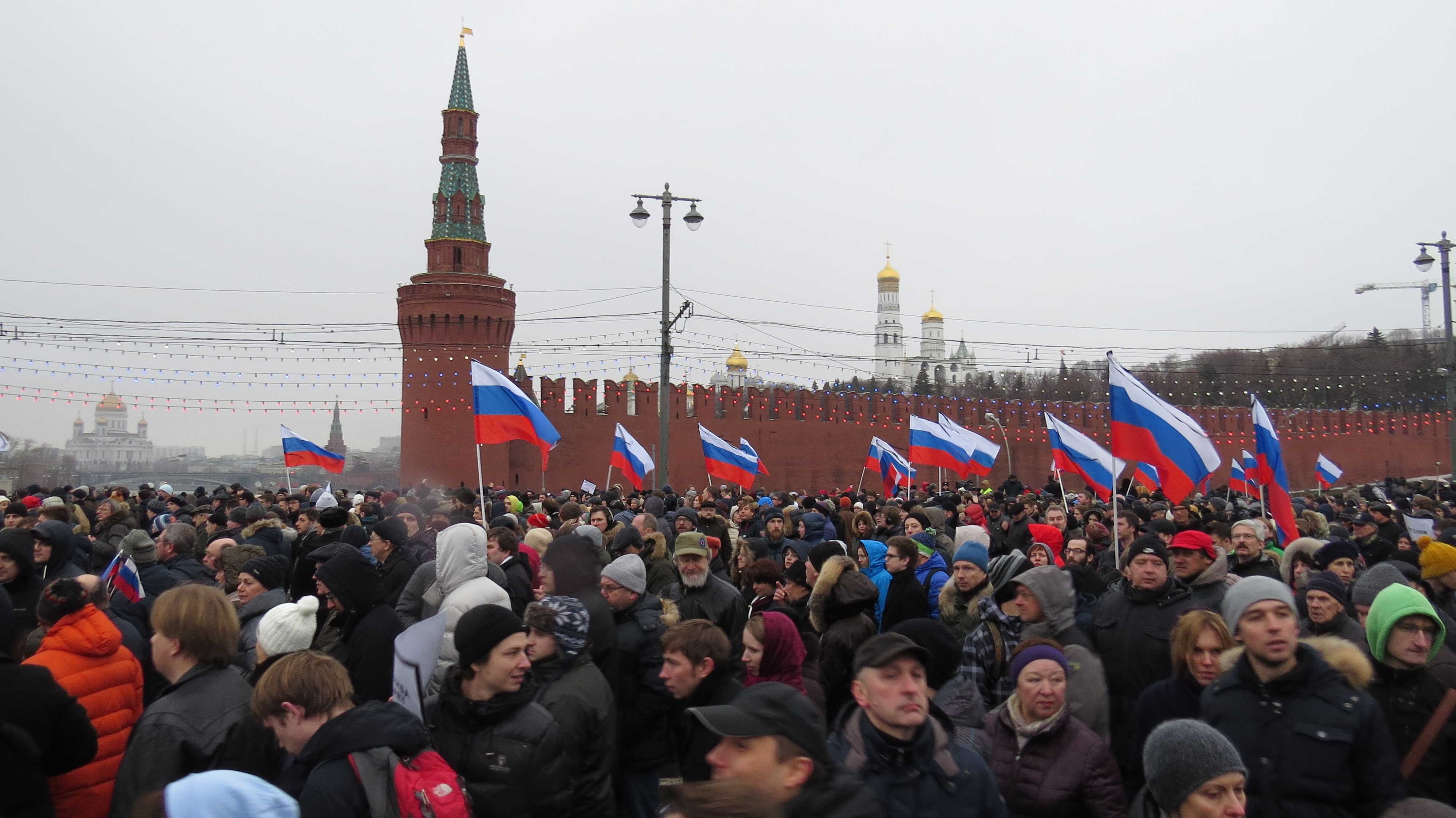 Марш памяти Бориса Немцова в Москве.